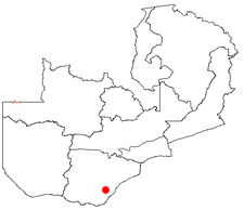 Lage von Maamba in Sambia